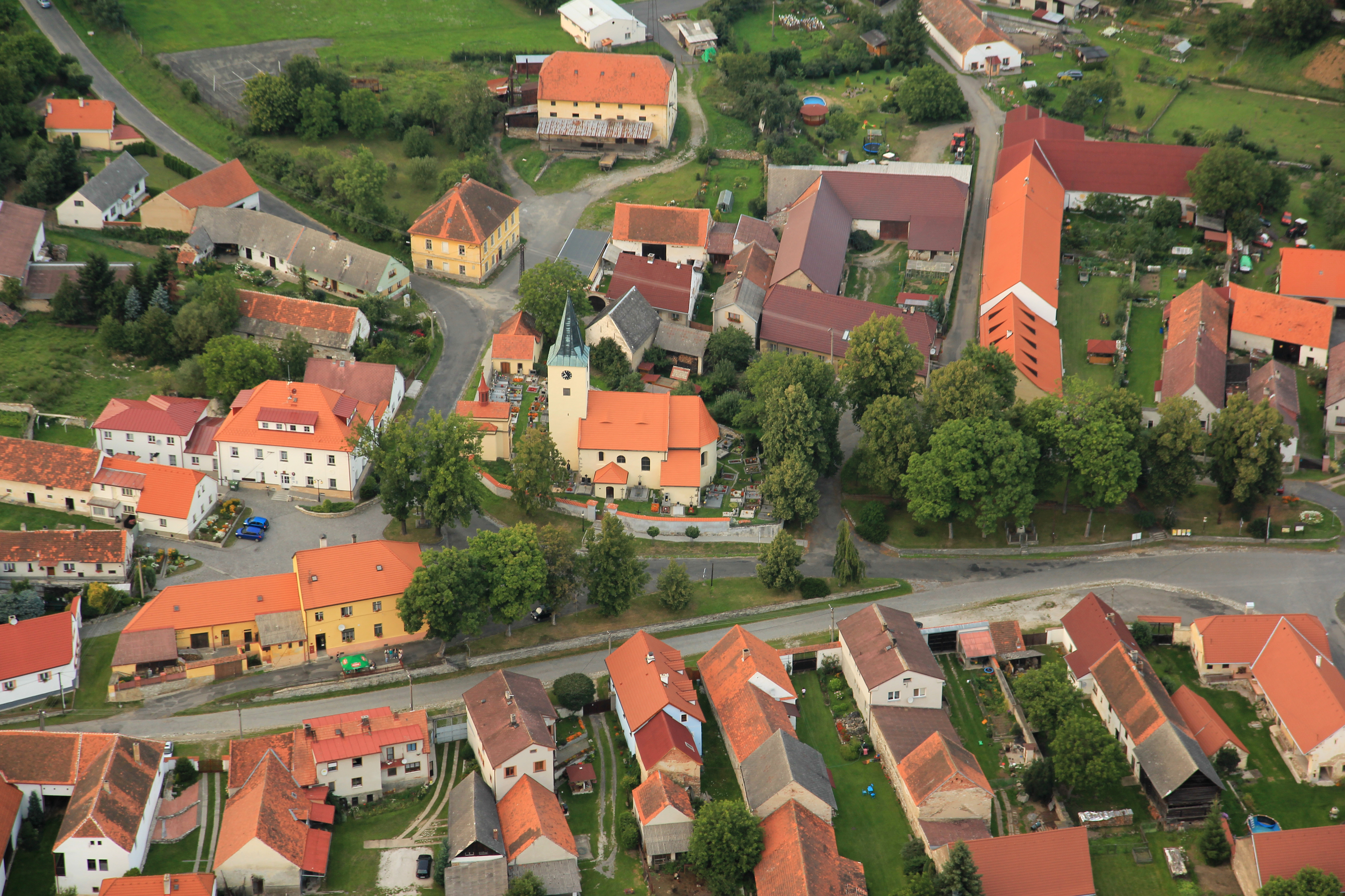 Kostel sv. Petra a Pavla (Budětice), Budětice